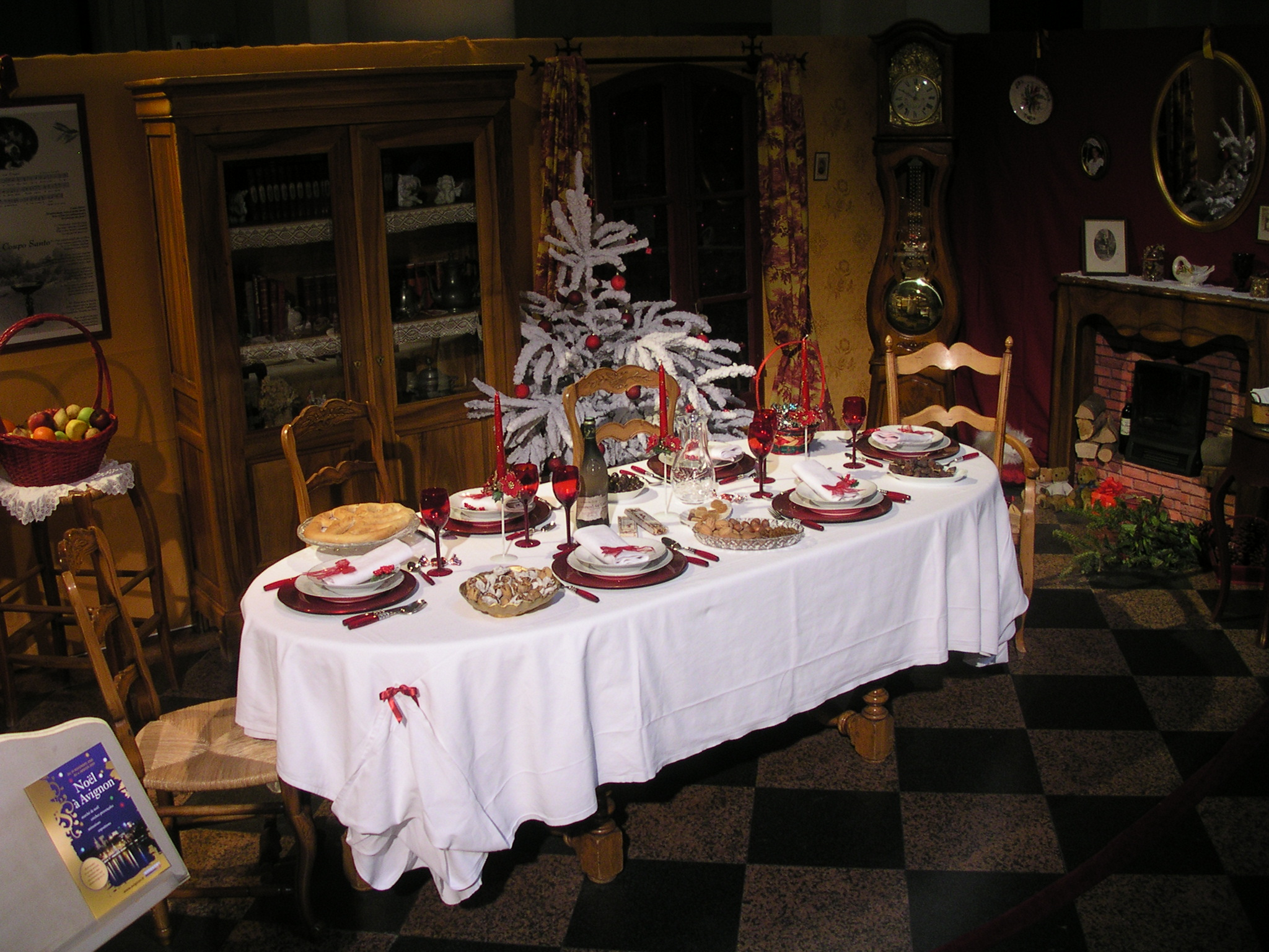 Table du gros souper de Noël avec ses trois nappes, reconstitution dans le hall de l'Hôtel de Ville d'Avignon